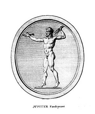 Jupiter-Foudroyant